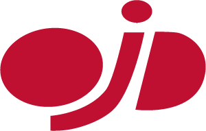 Logo simple de OJD